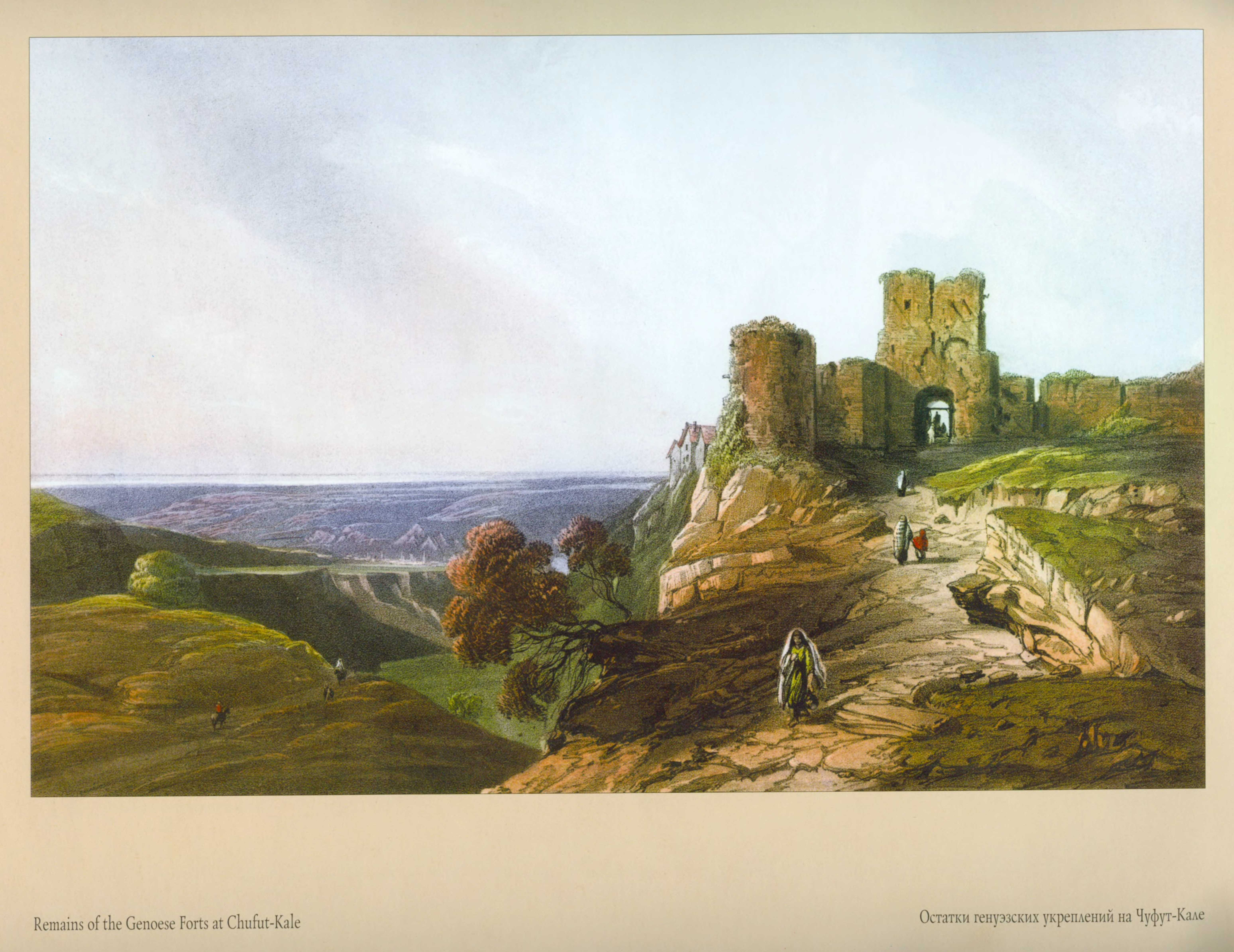 Карло Боссоли. Чуфут-Кале. Остатки генуэзских укреплений